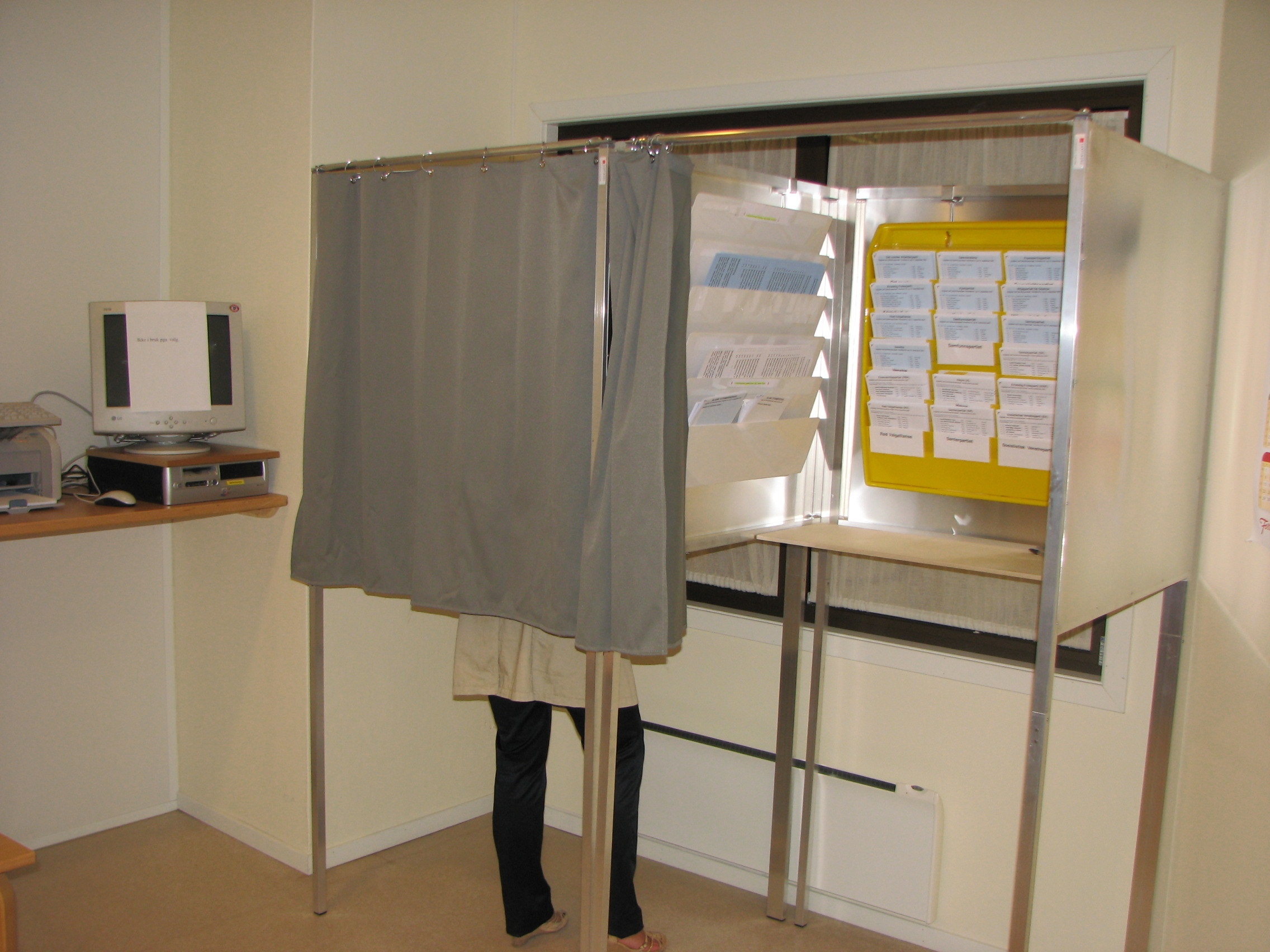 Stemmeavlukket ved kommune og fylkestingsvalg, fra forhåndsstemming (men, ellers lik)